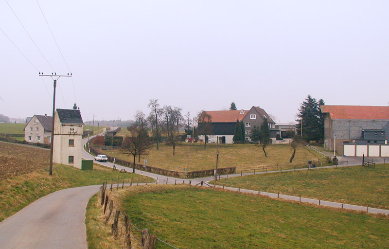 Kormannshausen, Hückeswagen, 2003